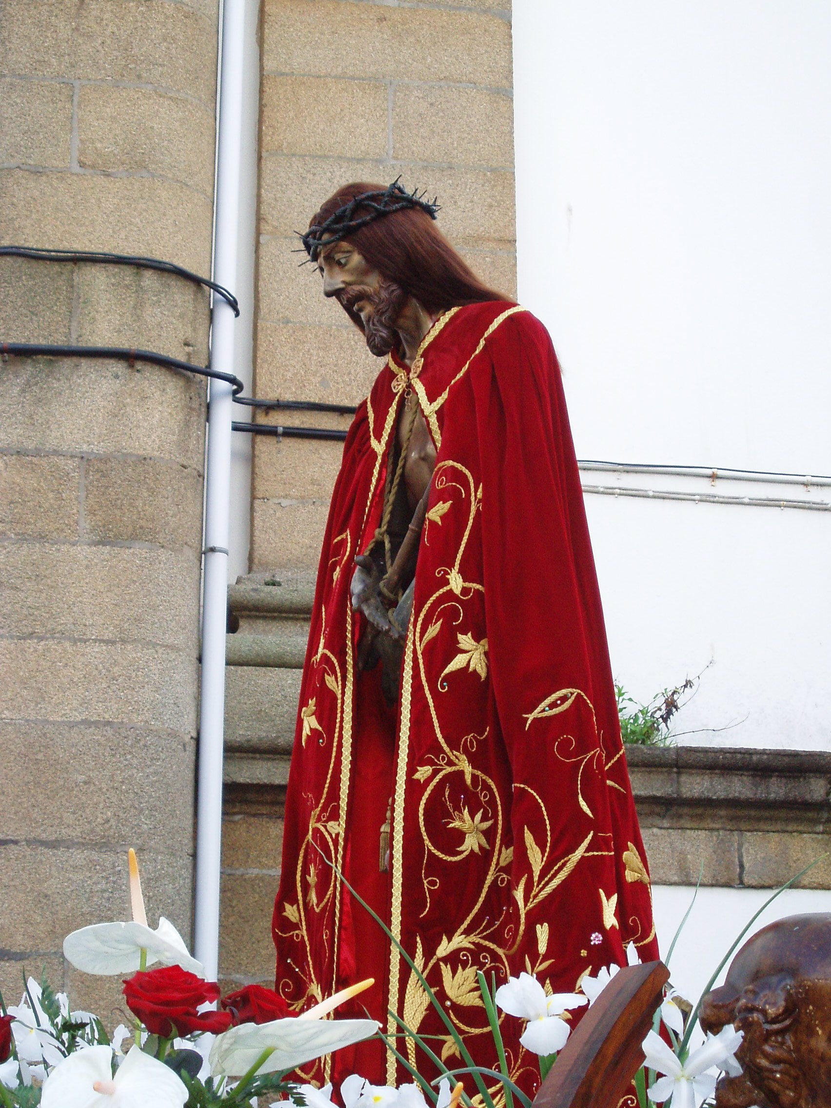 Talla del Ecce Homo en la tarde del Domingo de Ramos de 2.010.